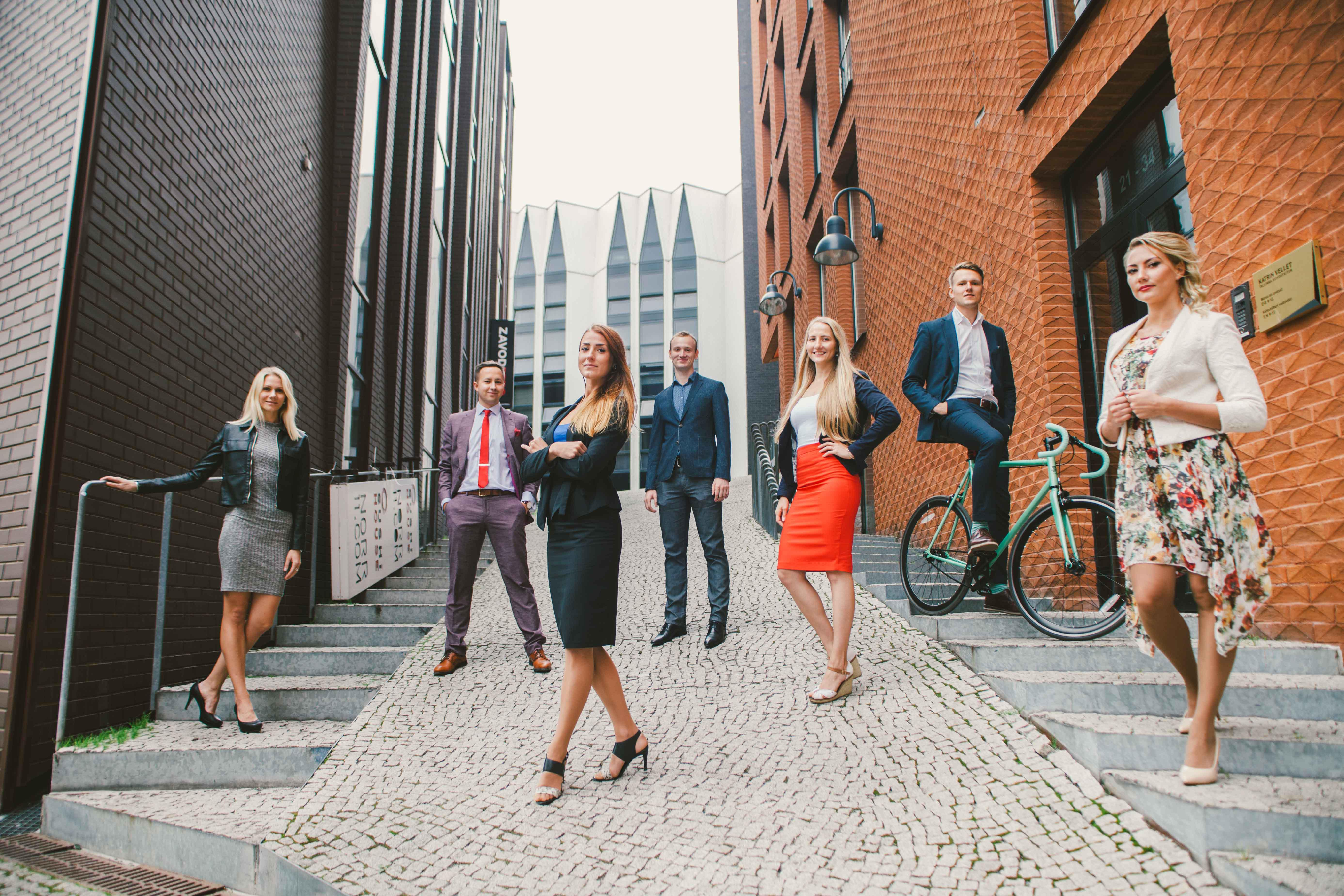 Ärikatla meeskond 2017. aastal